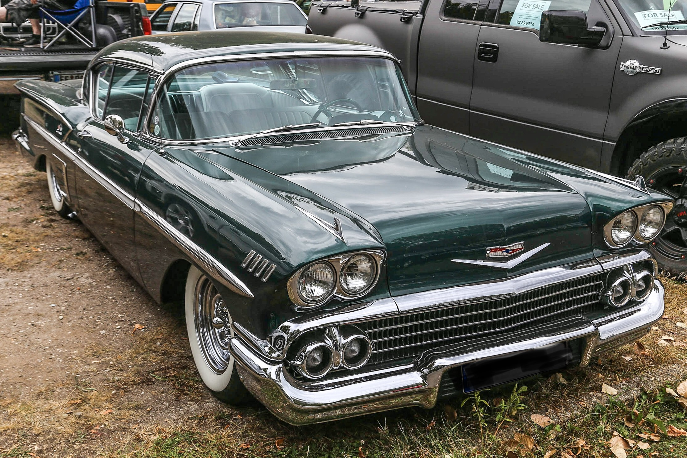 1958 Chevrolet Impala 2-Türer